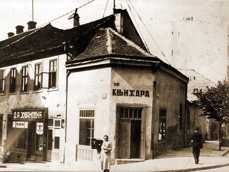 Srpski (latinica): Knjižara Velimira Valožića koja se nalazila na uglu Pop Lukine i Kosančićevog venca, tada Varoš-kapija. Fotografija je sa početka 20. veka.